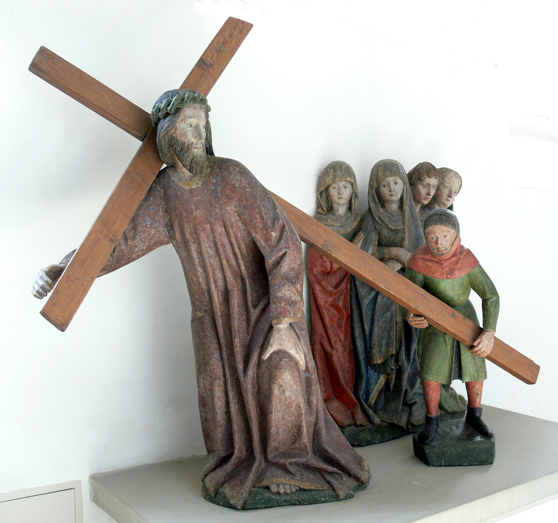 Münster Heiligkreuztal (ehem. Klosterkirche, heutige Pfarrkirche St. Anna) Kreuztragungsgruppe von Hans Multscher und Werkstatt, um 1450 Hans Multscher: Kreuztragender Christus Werkstatt Multscher: Simon von Cyrene, Apostel und heiligen Frauen